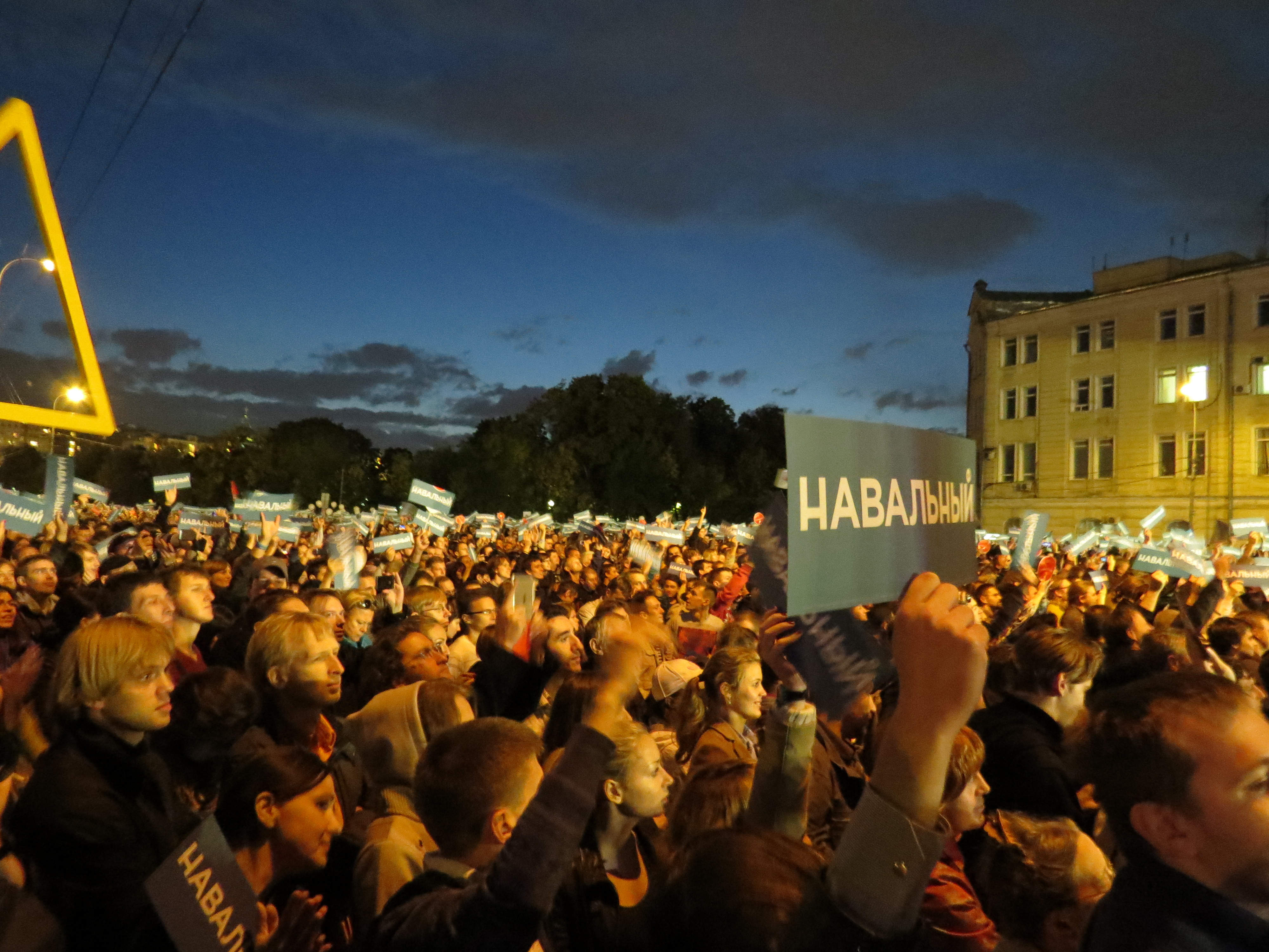 Митинг Алексея Навального на Болотной площади после объявления результатов выборов мэра Москвы, 9 сентября 2013 года